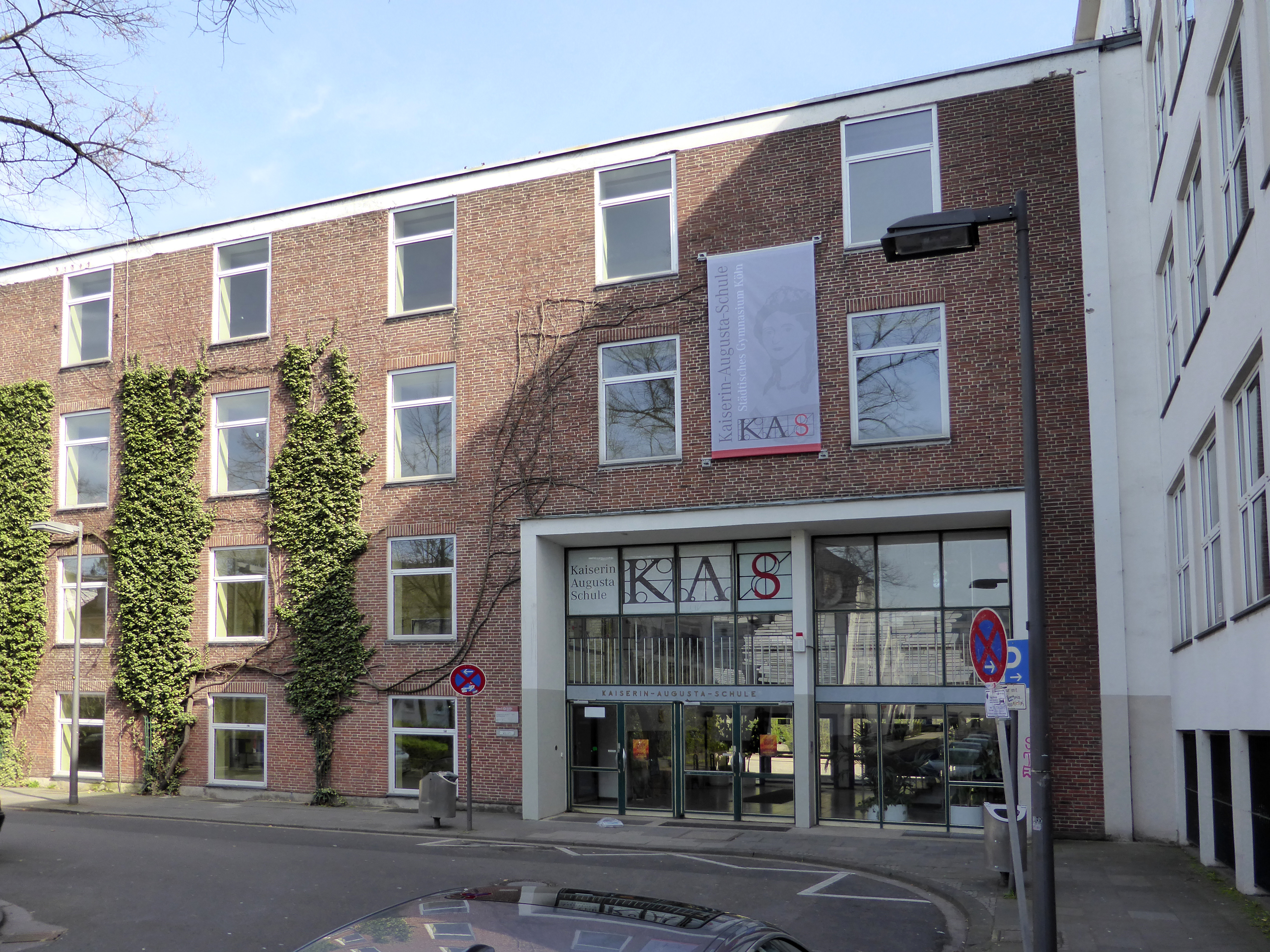 Stolperstein: Verlegestelle Georgsplatz 10 (Kaiserin-Augusta-Schule), Köln.